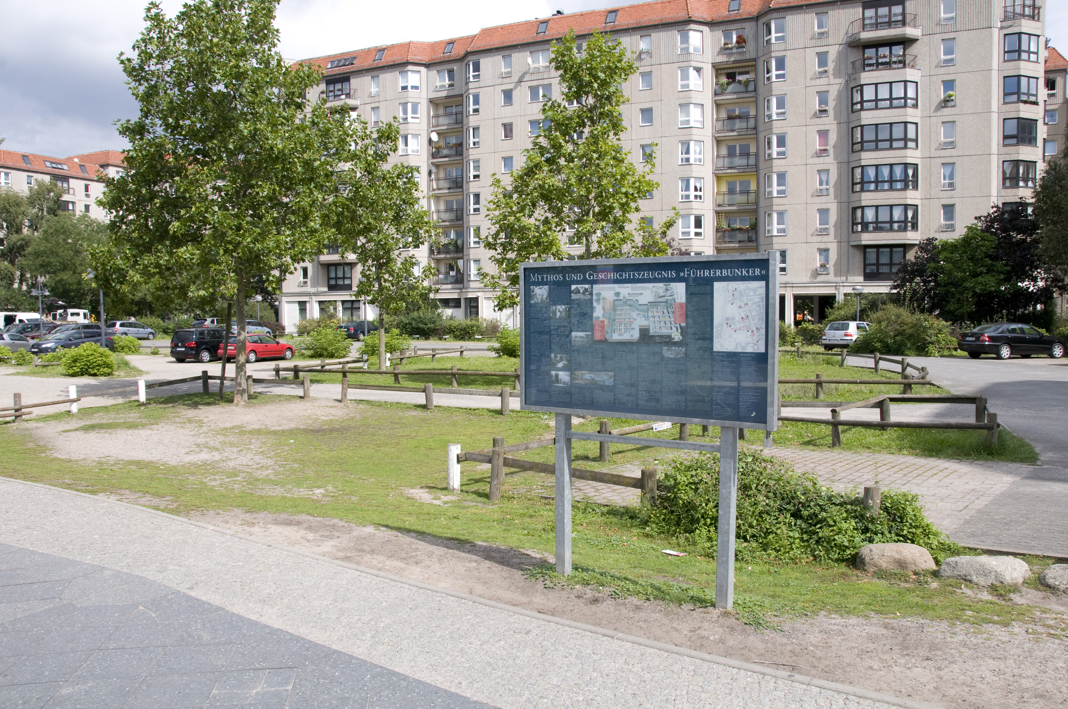 Dit is de plek in Berlijn waar de restanten van de zgn. Führerbunker onder de grond zitten.